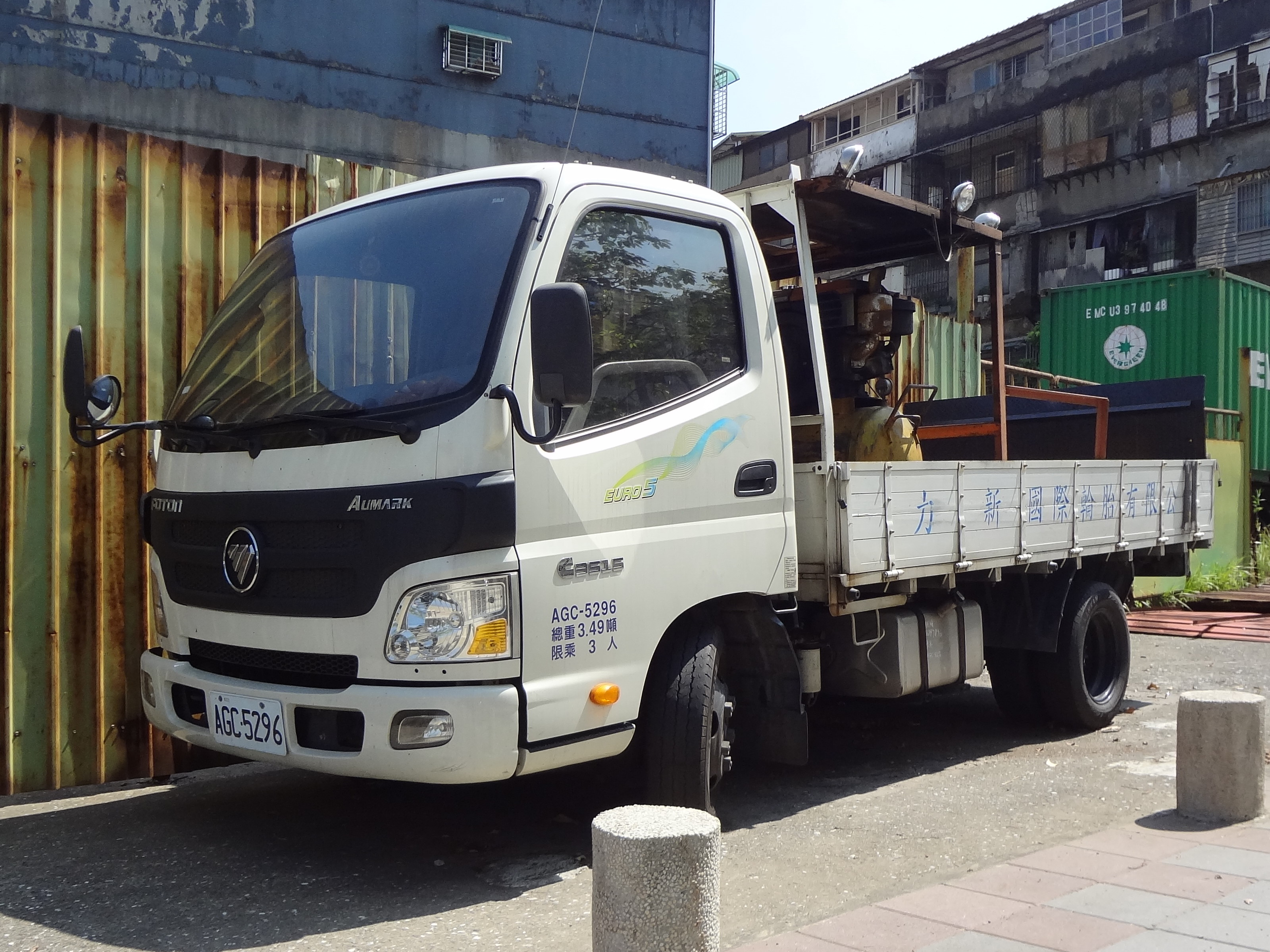 福田Aumark貨車AGC-5296。